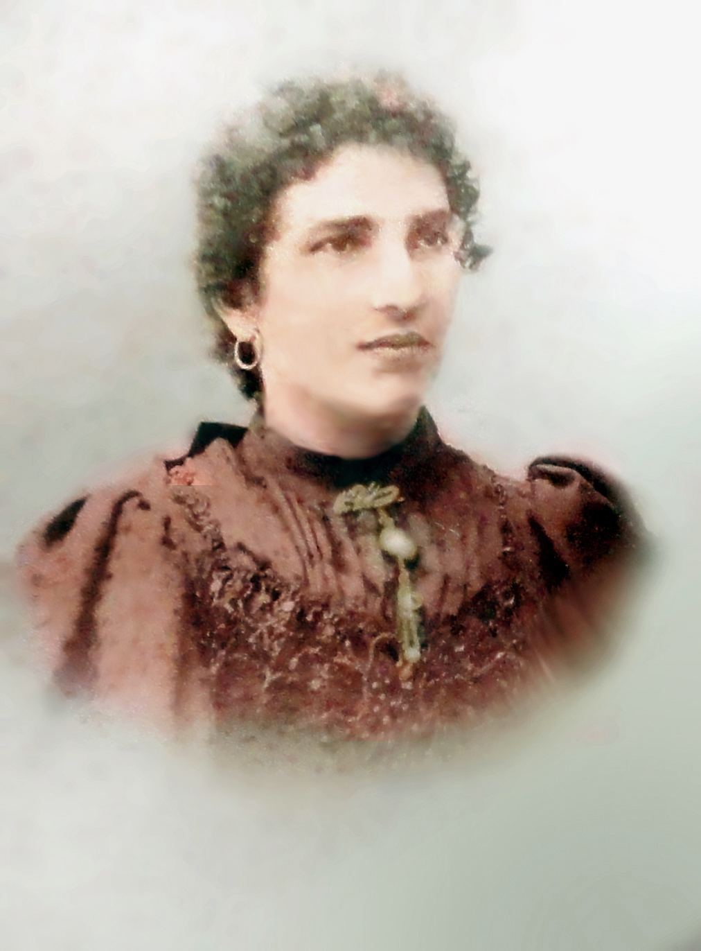 Maria Sartori, filha de Salvador Sartori e Angela Zancaner.